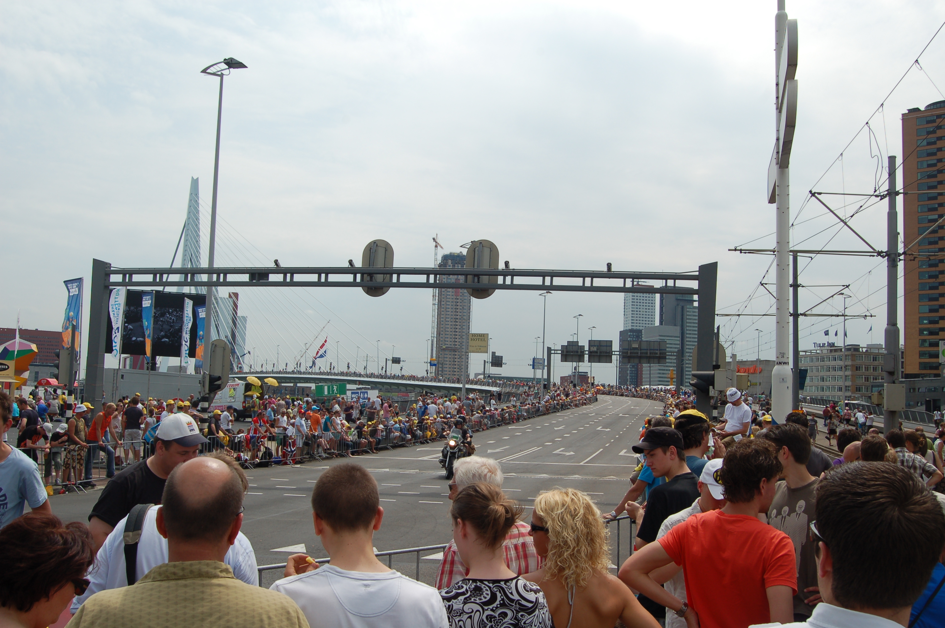 Prologue du Tour de France 2010 à Rotterdam - Public à l'entrée du pont Érasme